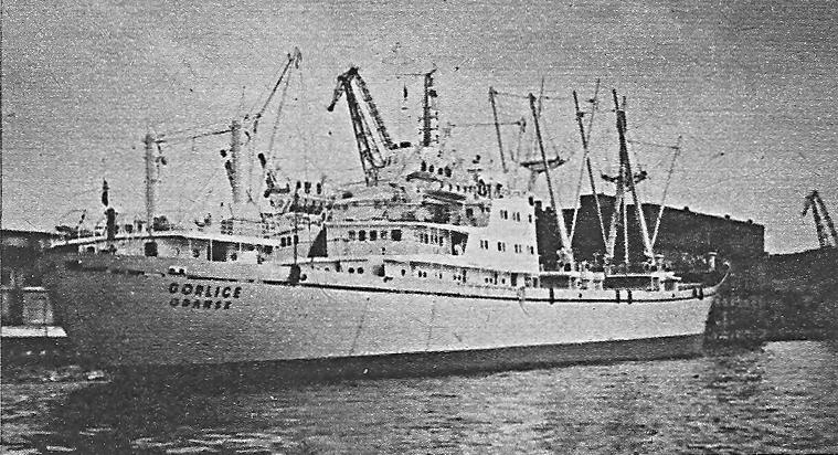 ms Gorlice